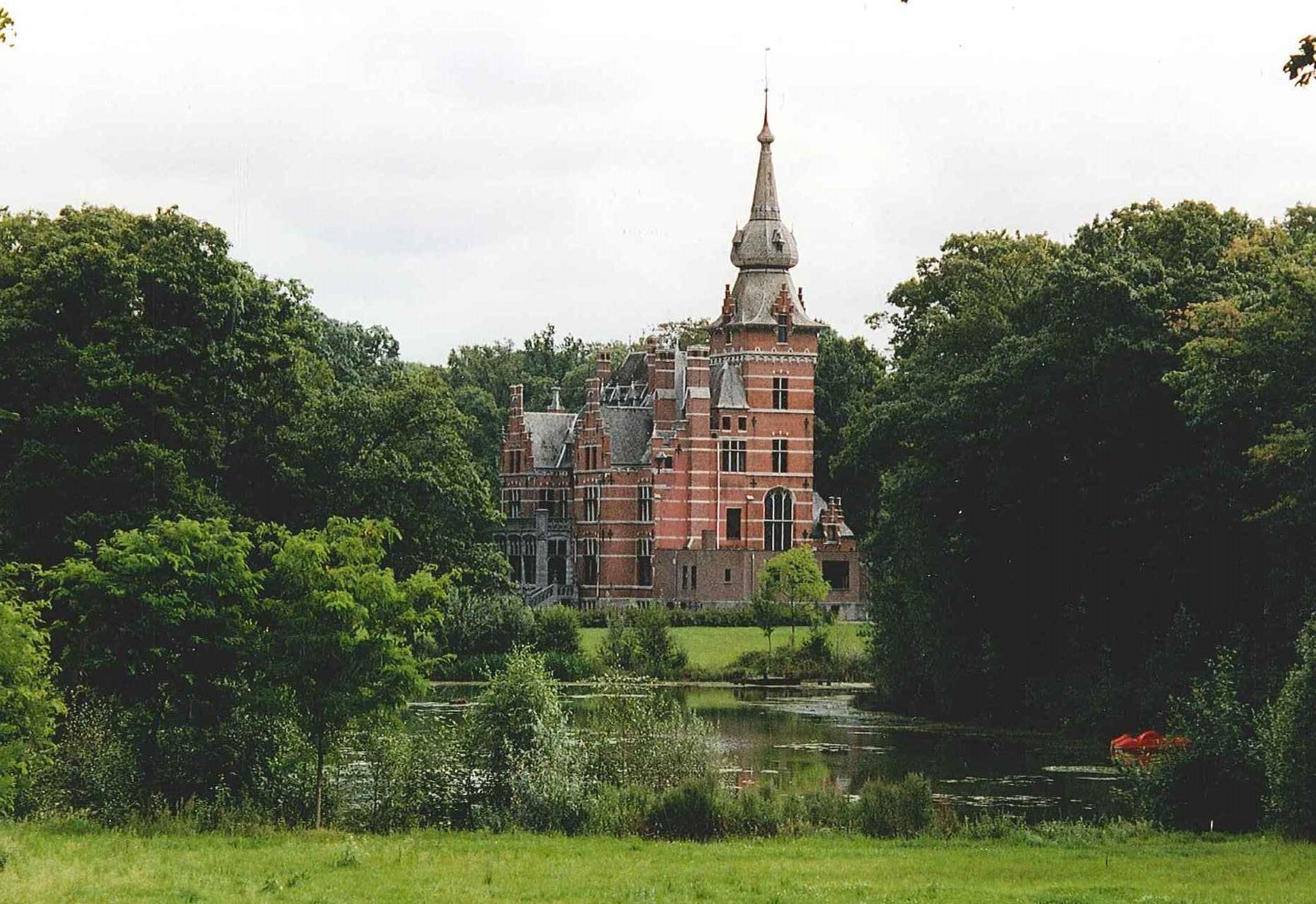 Retie Kasteelstraat 60